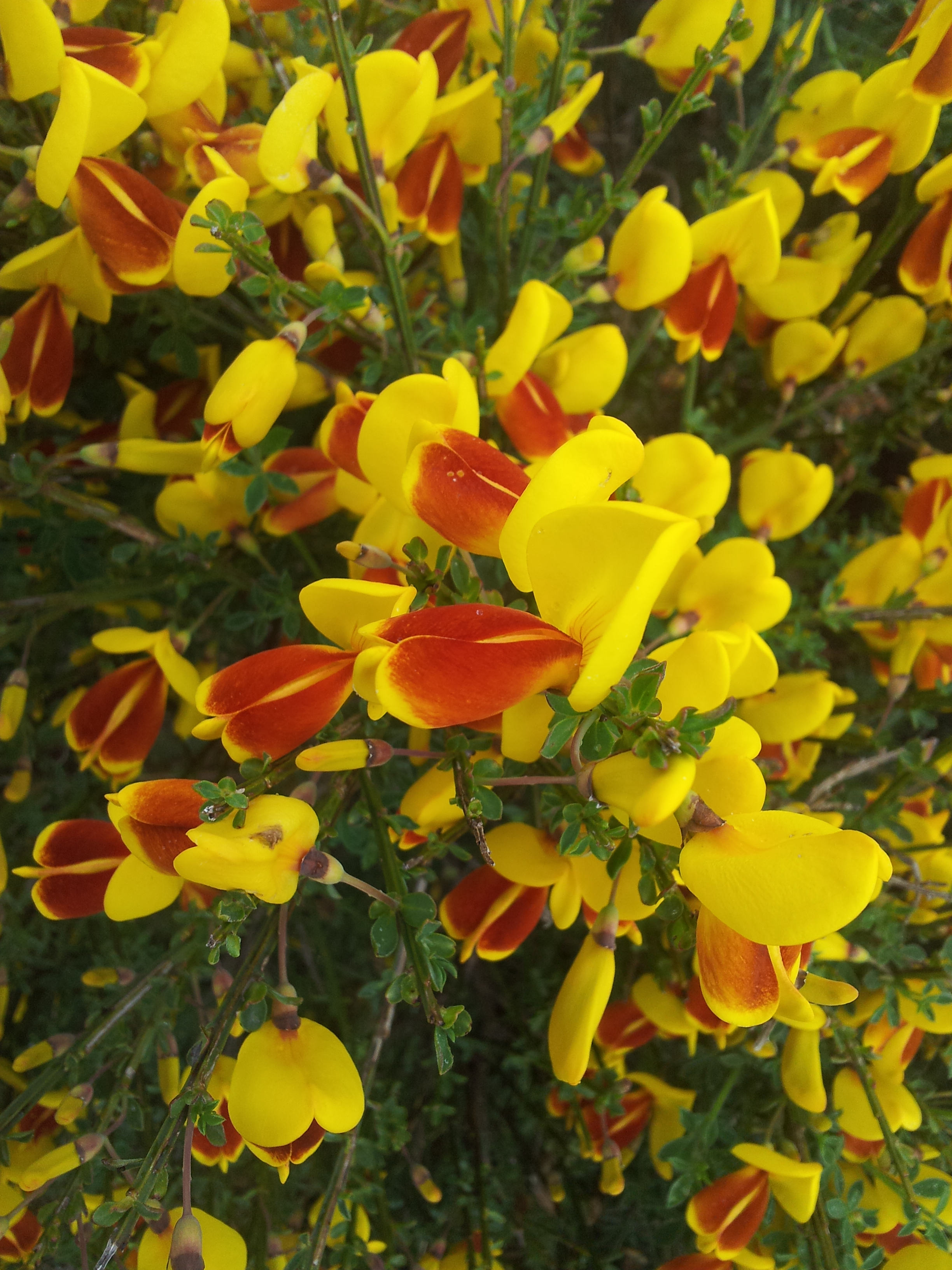 Genêt qui pousse sur le plateau de la bataille de Culloden (Ecosse)